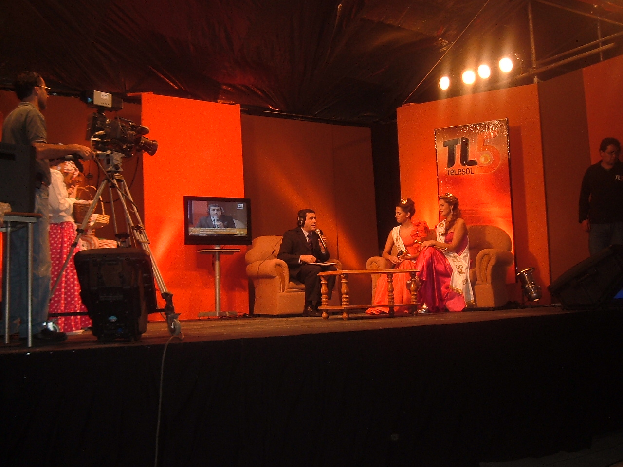 Vista del estudio de Canal 5 Telesol, montado en la Fiesta Nacional del Sol, durante una entrevista a las Reina y virreina nacional del Sol 2009.